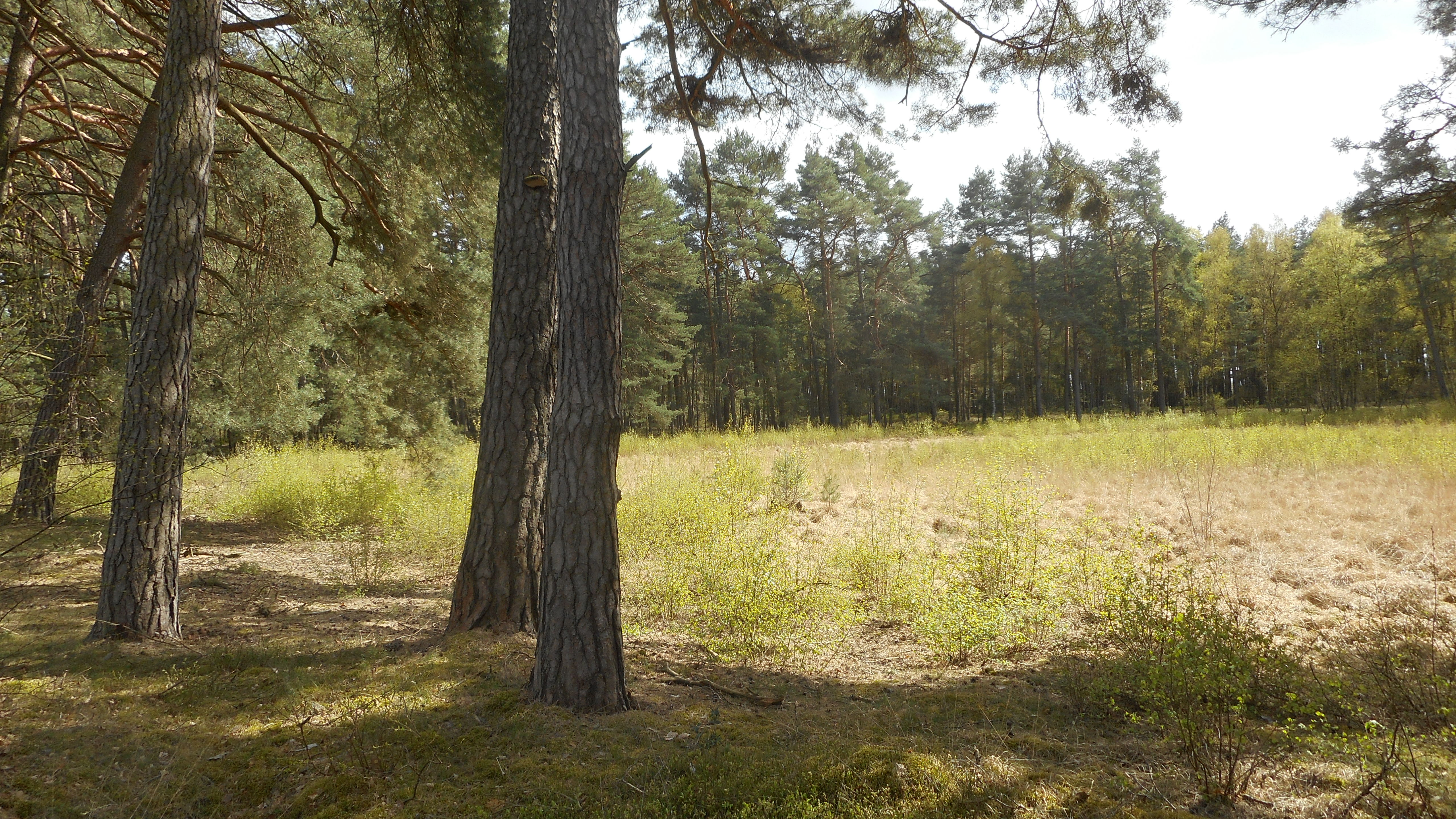 Naturschutzgebiet „Blaues Wasser“ in 19294 Eldena, Landkreis Ludwigslust-Parchim.